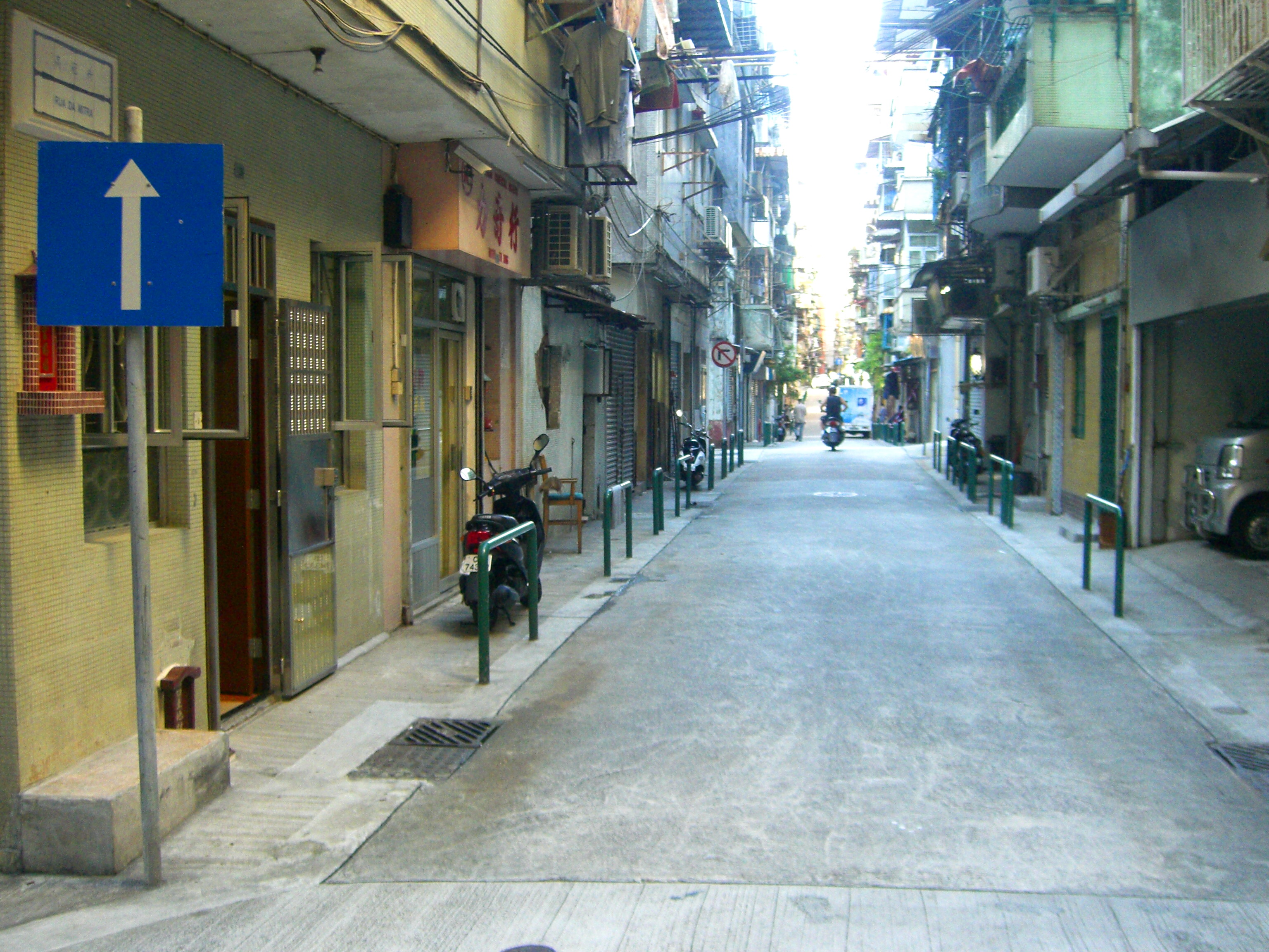 Rua da Mitra